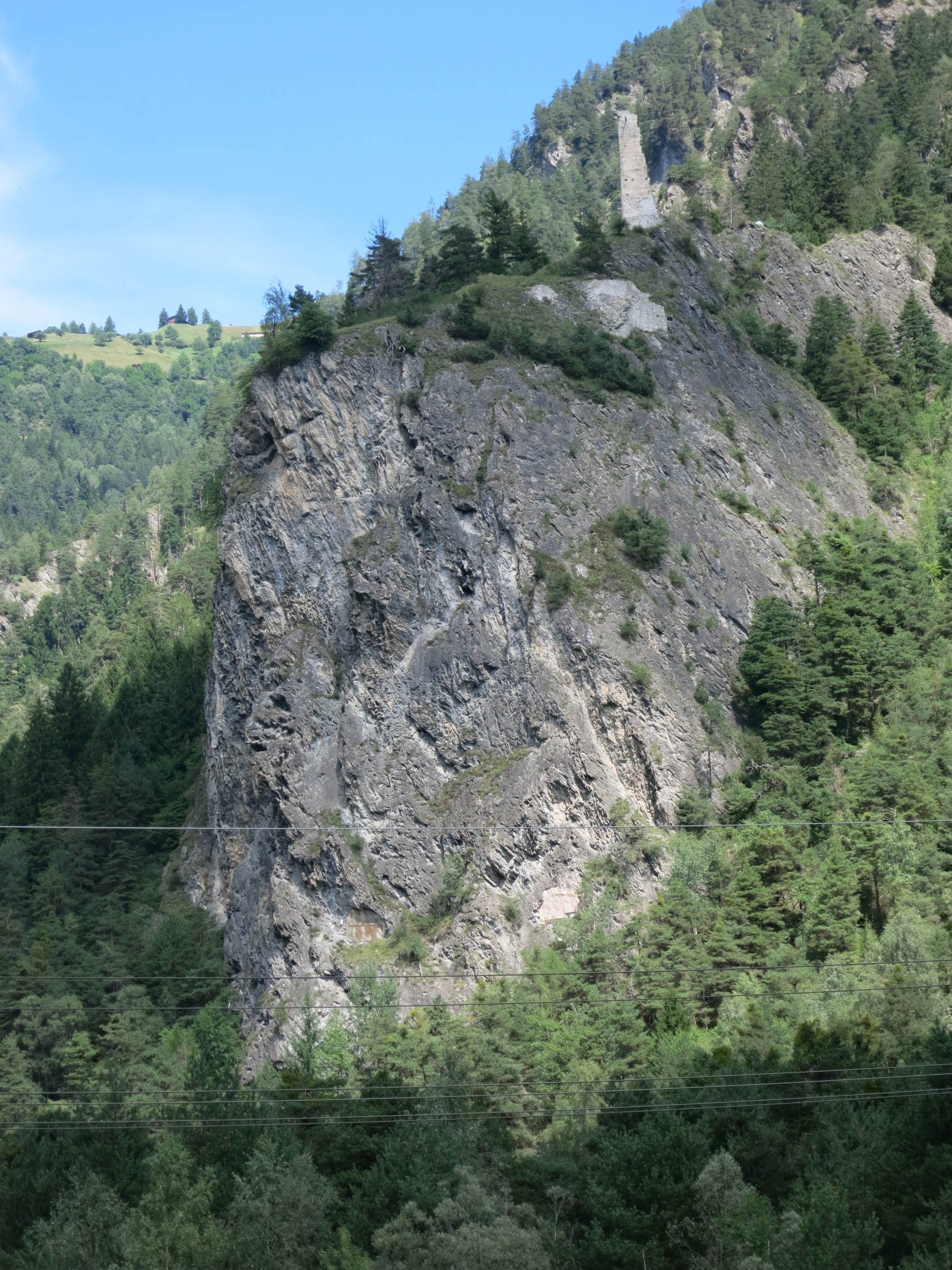 Sperrstelle Rothenbrunnen GR, Schweiz